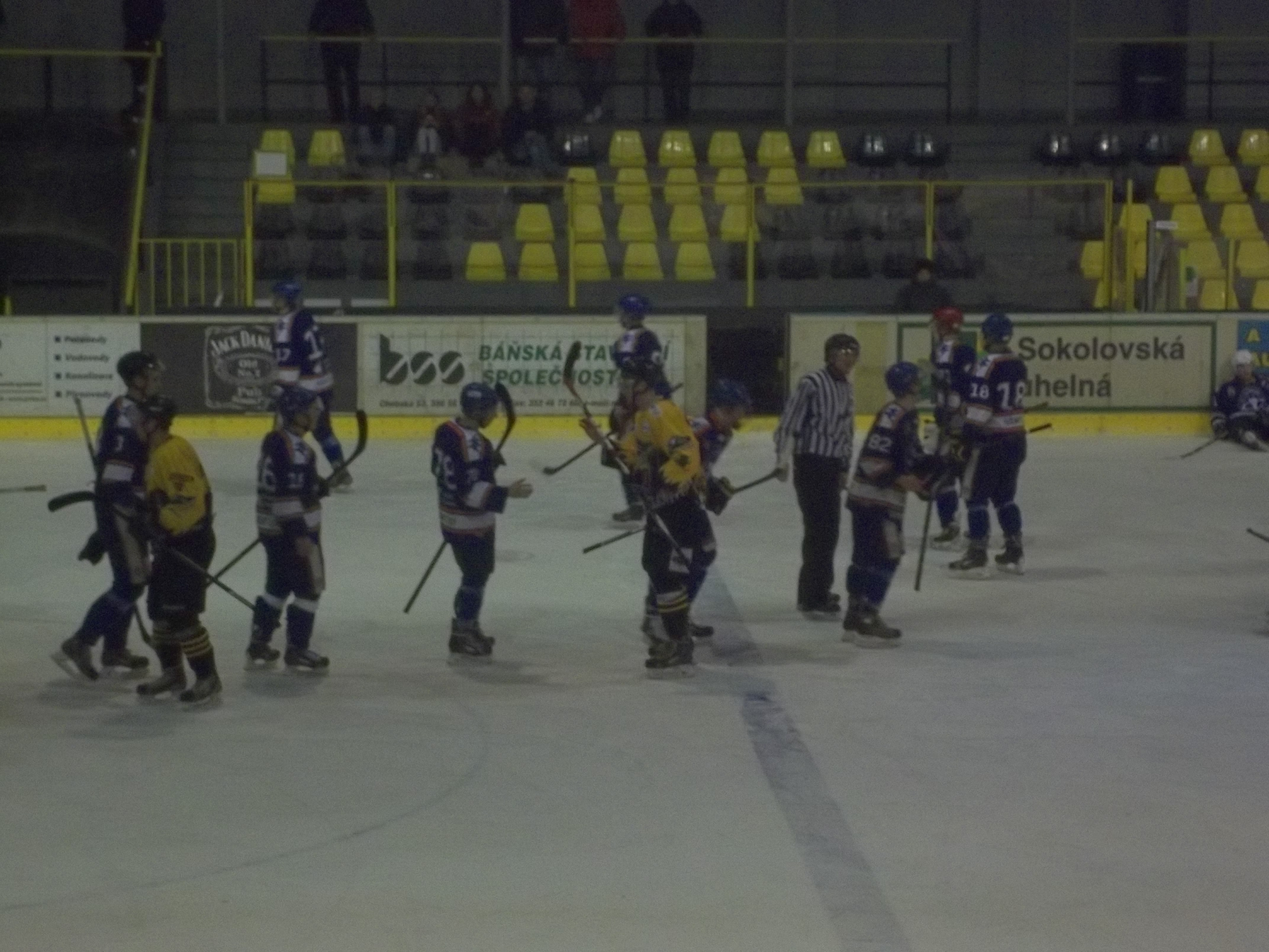 liga juniorů